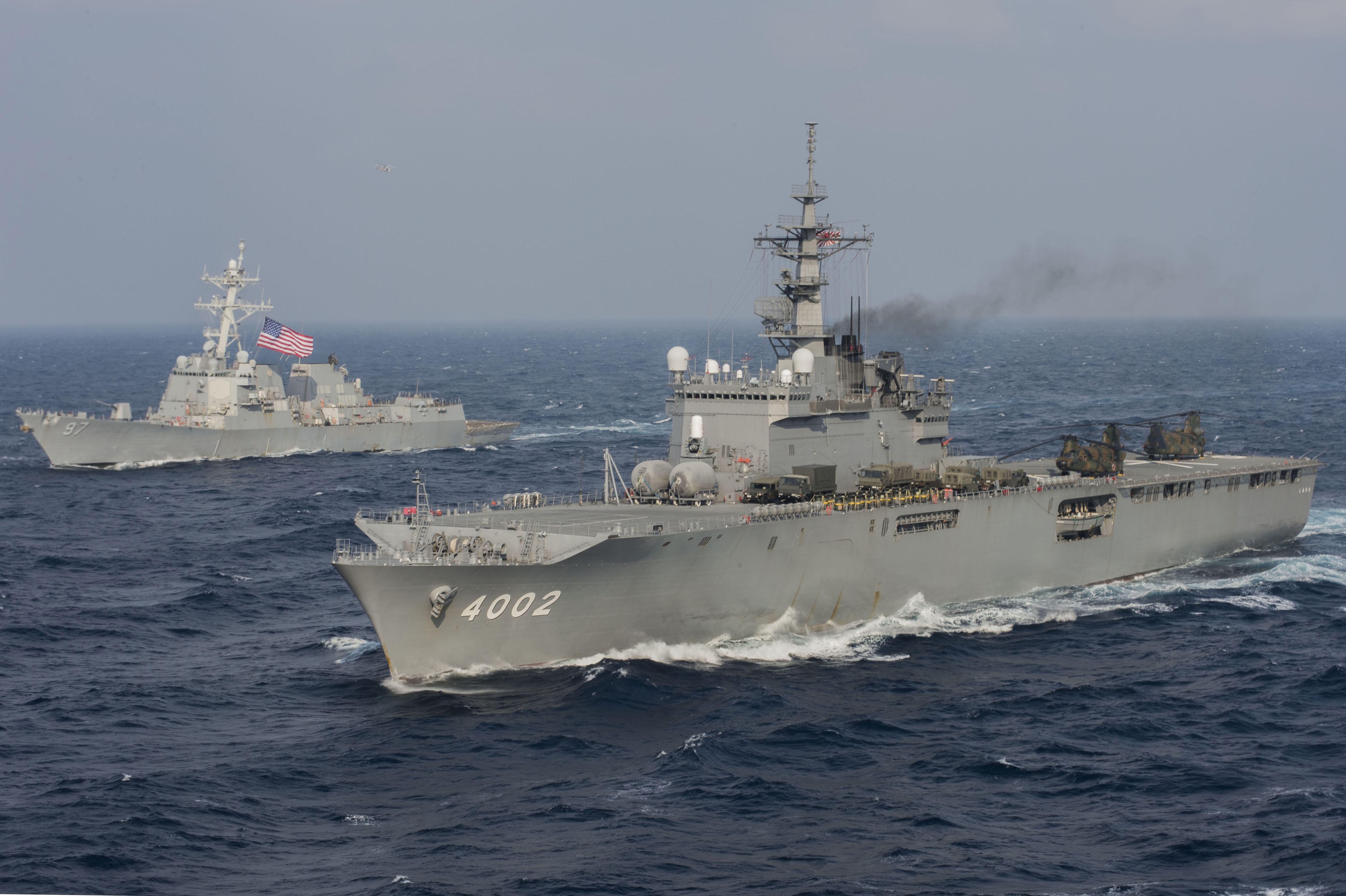 太平洋を航行する輸送艦しもきたと米駆逐艦ハルゼー 〔左奥〕。日米共同統合演習キーン・ソード2015に参加中。